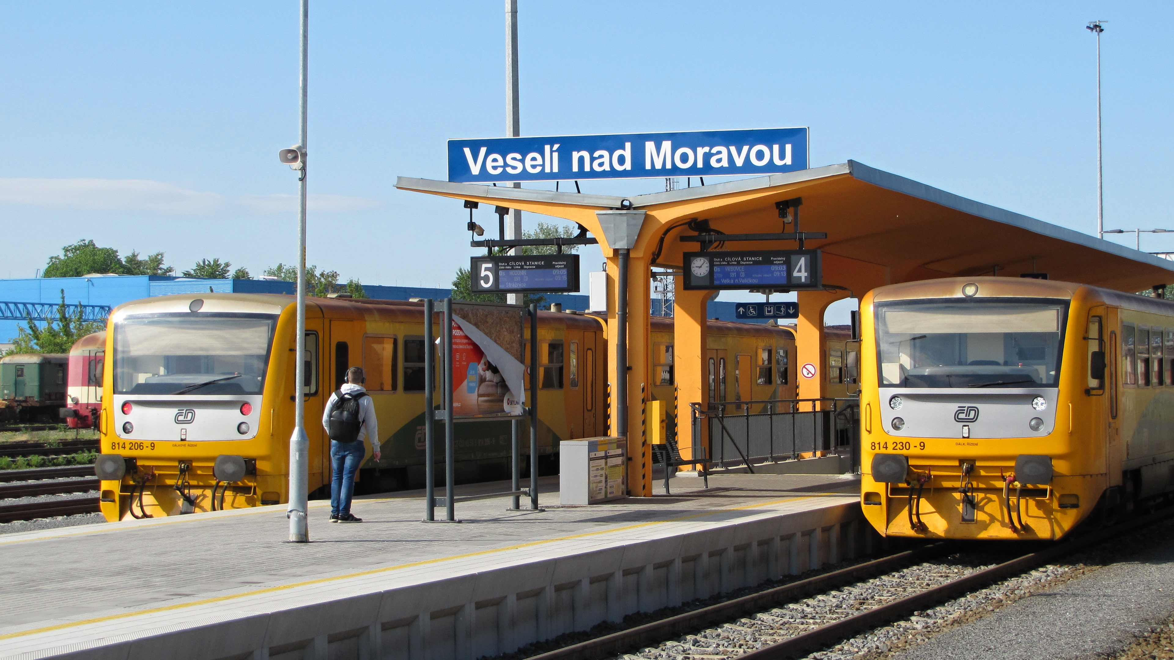 Železniční stanice Veselí nad Moravou, nástupiště č. 3, motorová jednotka 814